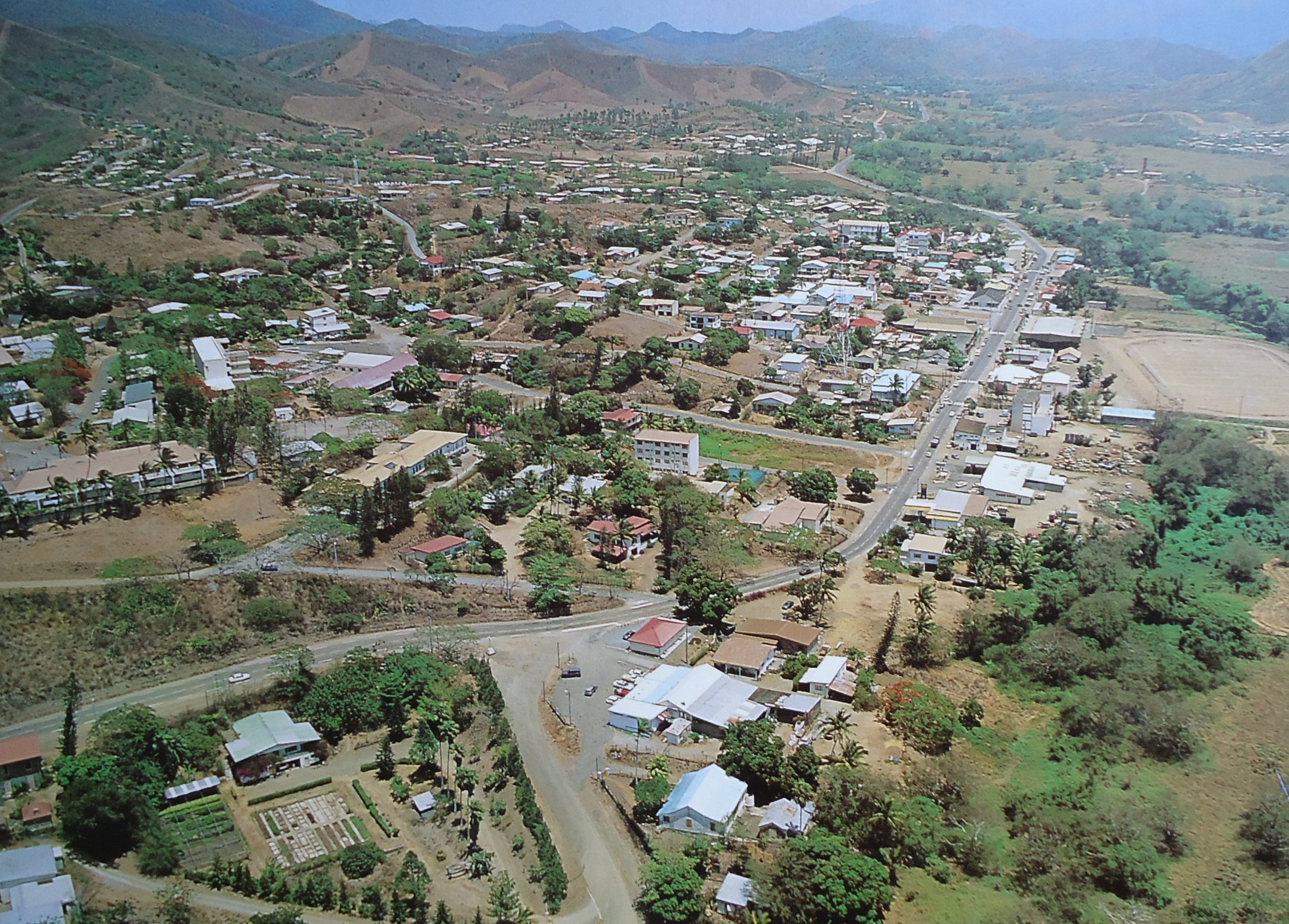 Vue aérienne sur Bourail